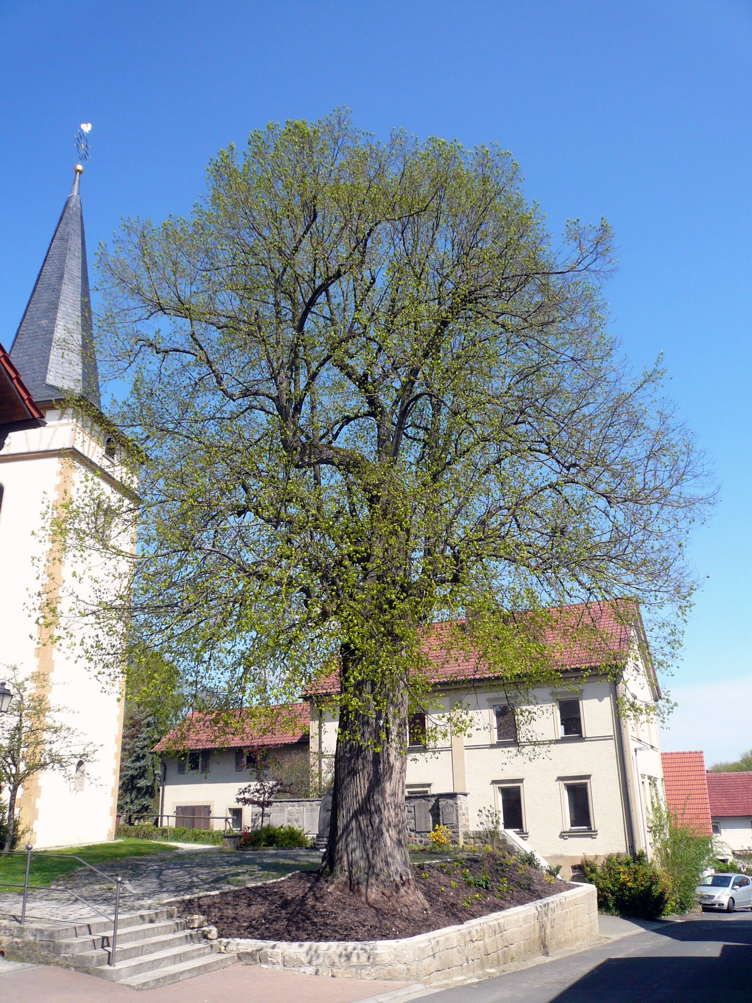 Alte Dorflinde in Eltingshausen